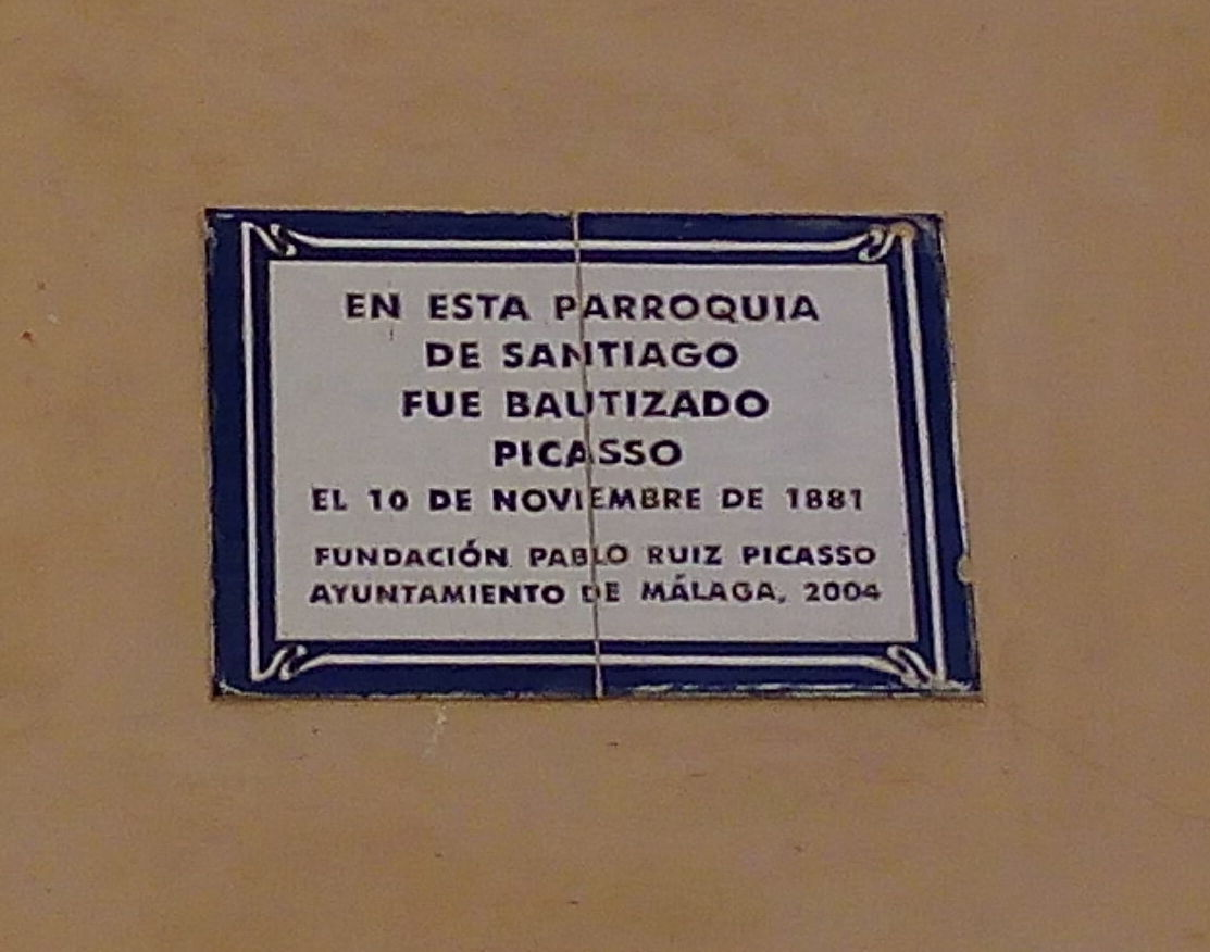 Placa conmemorativa del bautizo de Pablo Picasso en la iglesia de Santiago Apóstol, en Málaga (España).